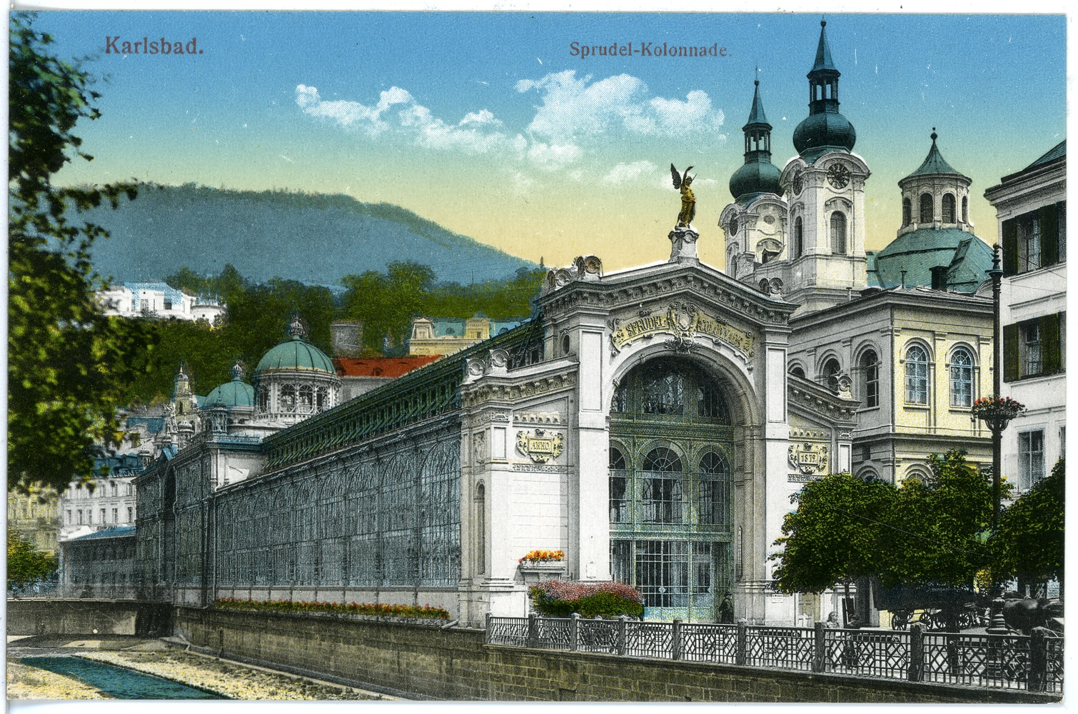 Karlsbad; Sprudelkolonnade This postcard is from publisher Brück & Sohn in Meißen ( postcard has a unique number 18807 and is available in a higher resolution at the publisher. This images was uploaded in a cooperation project between Wikipedians and the publisher.